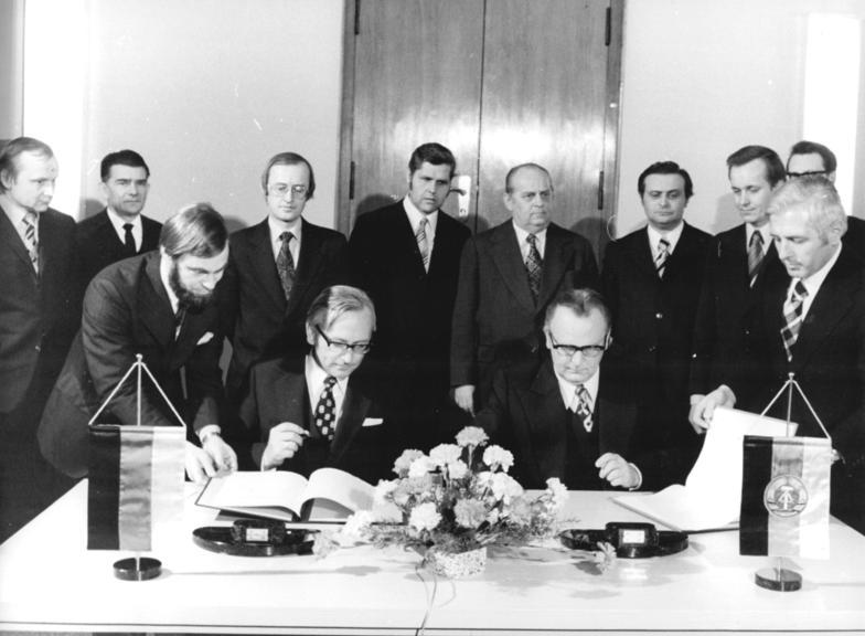 ADN-ZB Sturm 19.12.1975 Berlin: Abkommen zwischen der DDR und der BRD unterzeichnet Der Abteilungsleiter im Ministerium für Finanzen der DDR, Hans Nimmerich (r.), und der Leiter der ständigen Vertretung der BRD in der DDR, Günter Gaus, unterzeichneten am 19.12.1975 im Haus der Ministerien ein Protokoll über die Neufestliegung der Transitgebührenpauschale für die Jahre 1976 bis 1979.